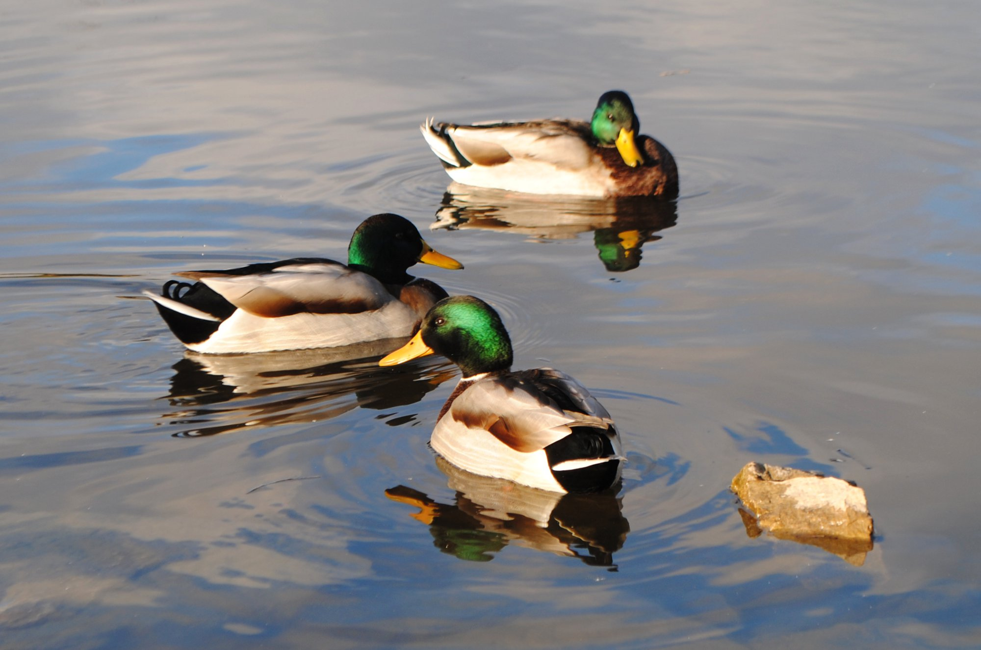 Sinikael-part on laia levialaga partlane, elunedes Euroopas, Aasias, Põhja-Aafrikas ja Ameerikas. Neis paigus on ta ka enamasti arvukaim partlane